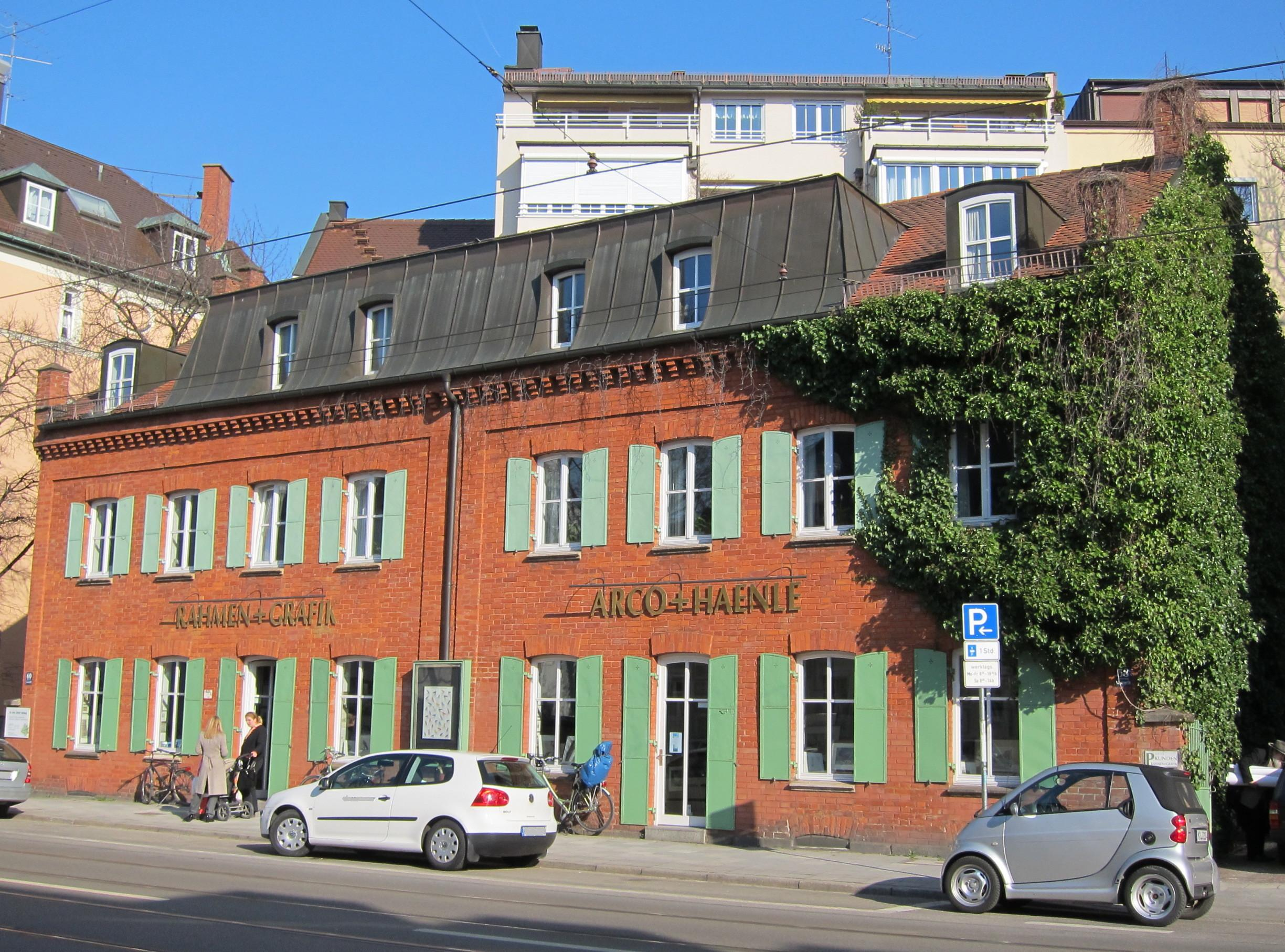 Ismaninger Straße 58/60; Block aus zwei kleinen Rohbacksteinhäusern mit Zinnengiebeln, 1881.